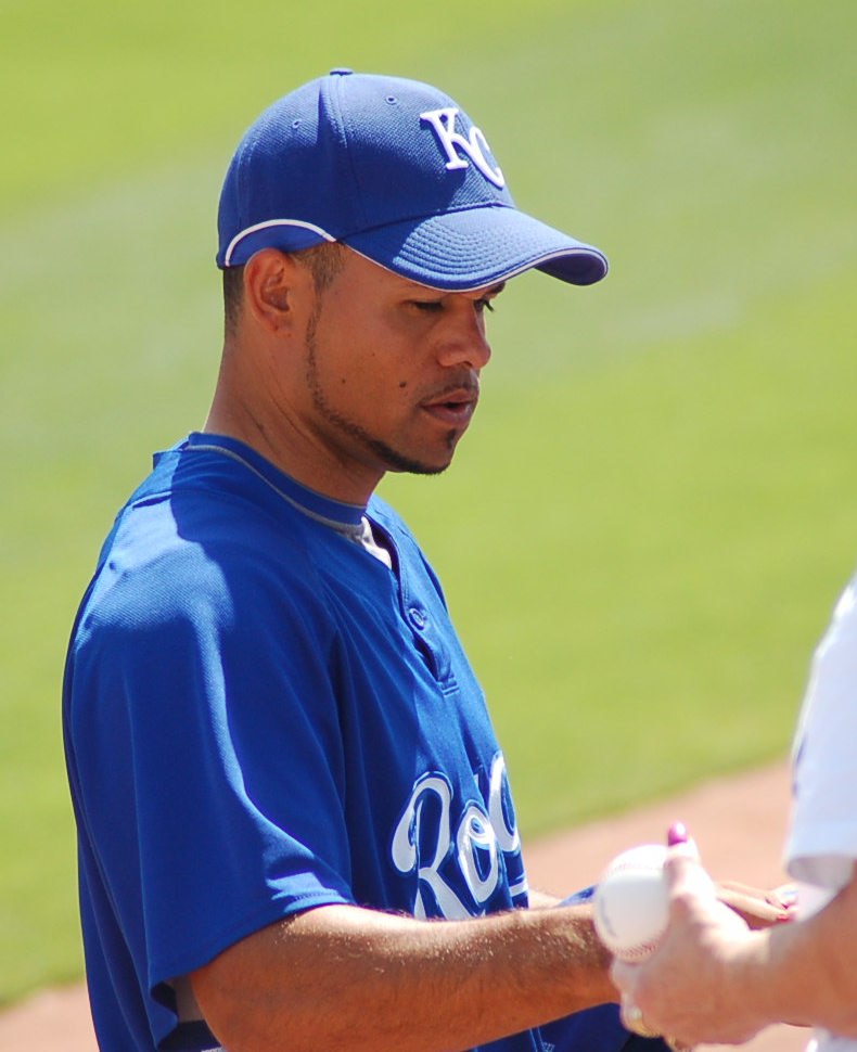 Coco Crisp